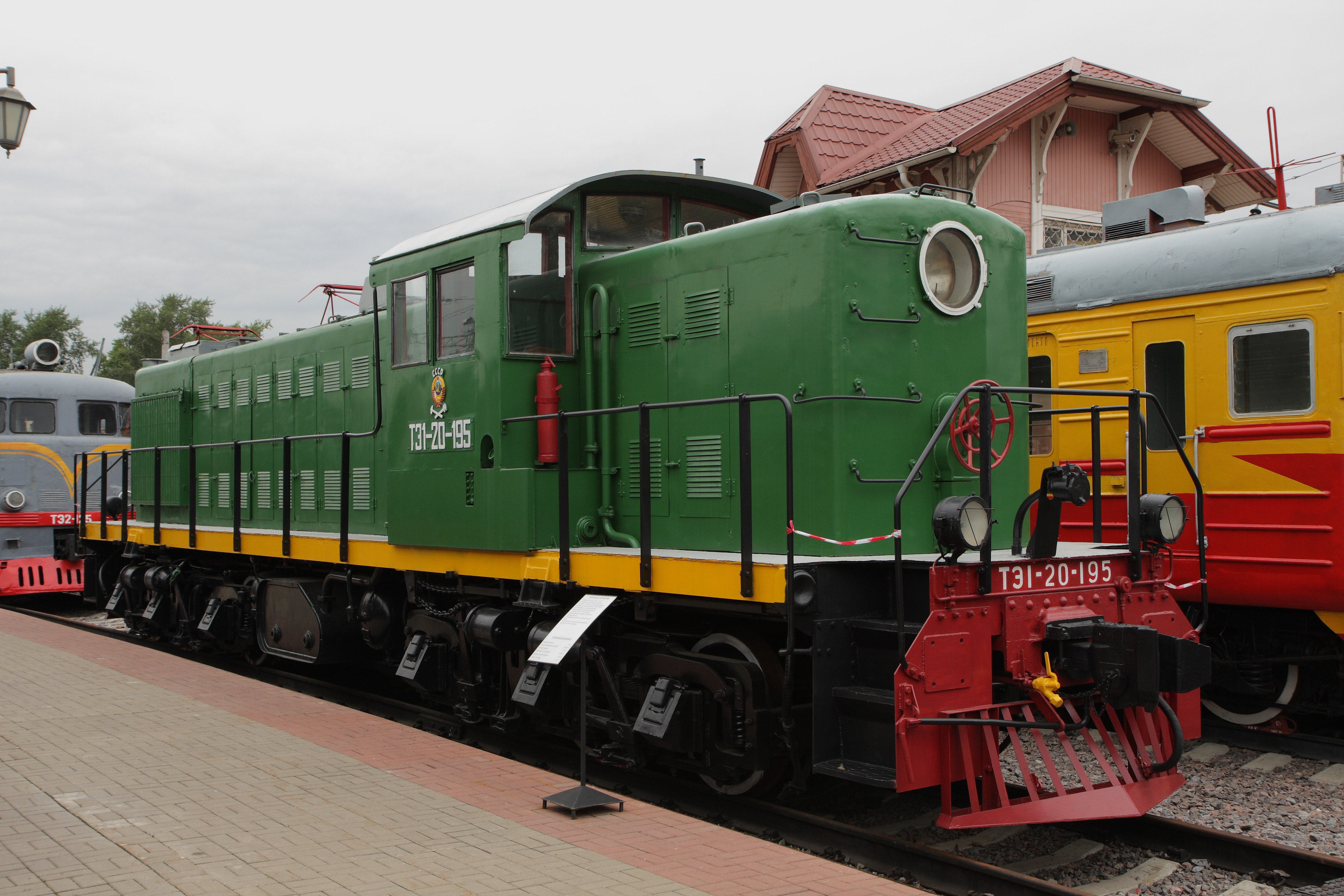 Тепловоз ТЭ1-20-195